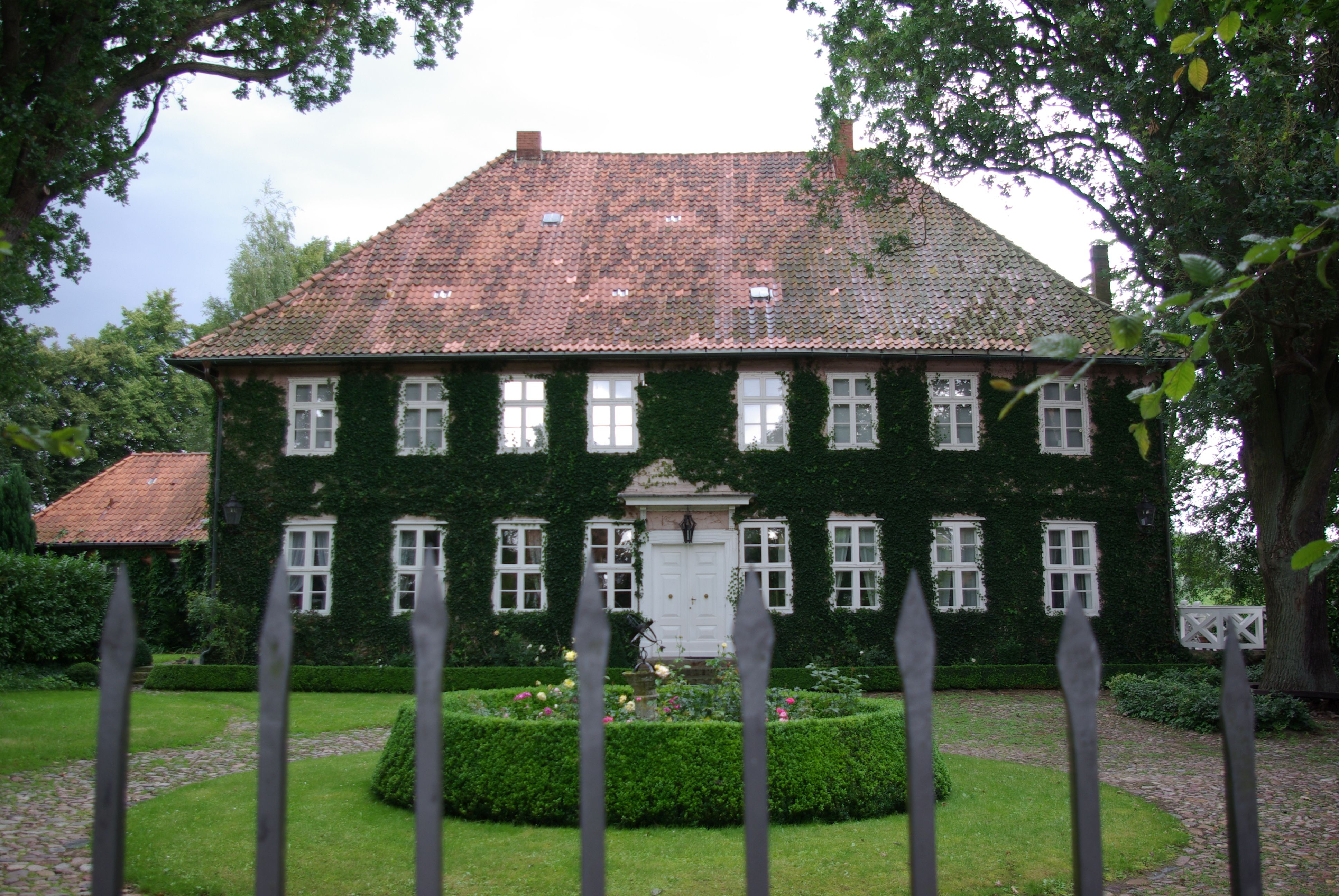 Schnackenburg in Niedersachsen. Der ehemalige Amtshof steht unter Denkmalschutz.